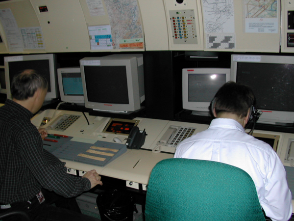 Radar approach room. 90's hardware. Coordinator is on the left, radar controller on the right. The picture has been slightly blurred to achieve safety and confidentiality.